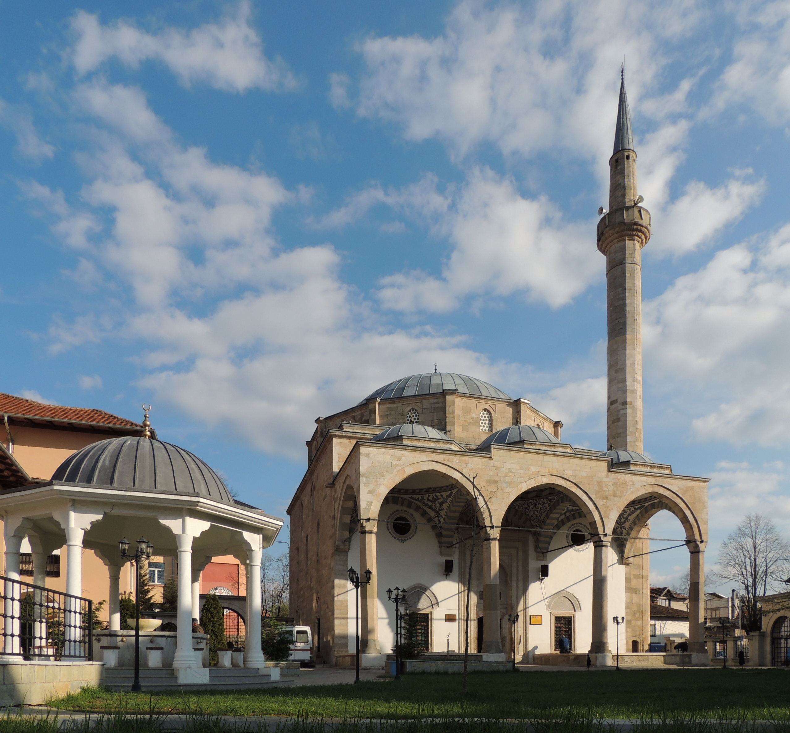 Xhamia e Mbretit